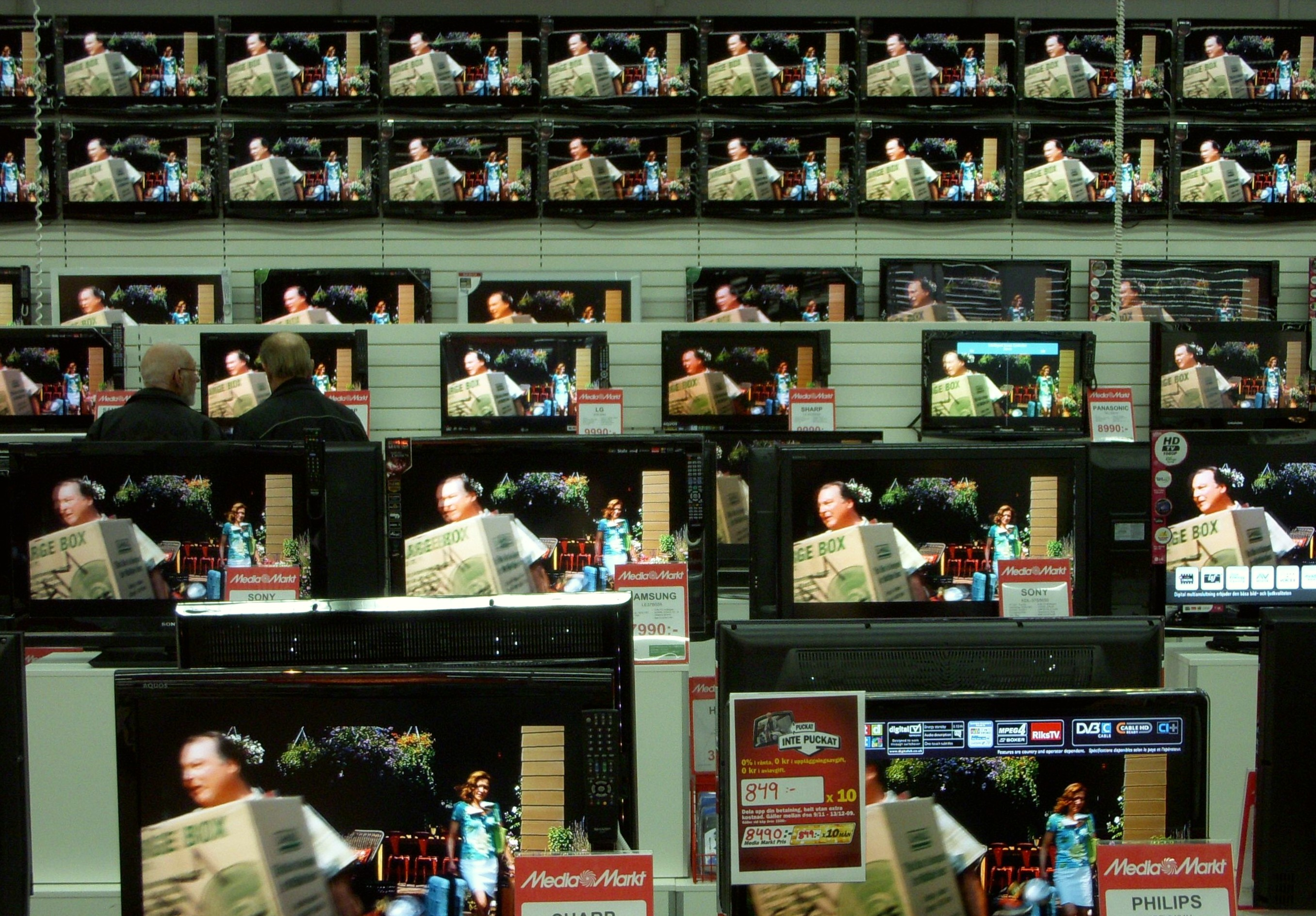 TV-mottagare i en elektonik-kedja